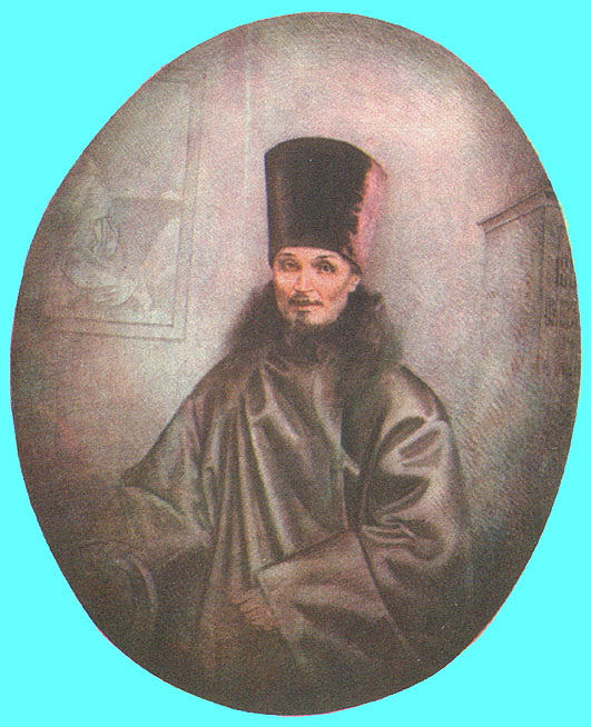 Знаменский Михаил Степанович, портрет Знаменского Стефана Яковлевича